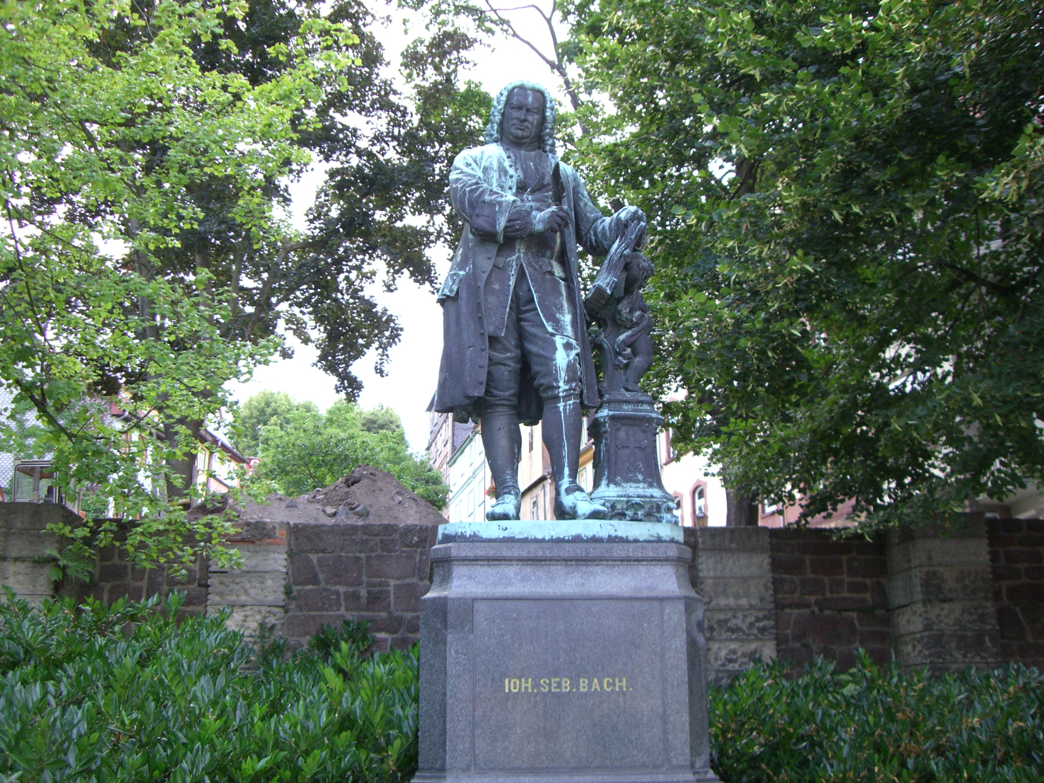 Bach-Denkmal von Adolf von Donndorf am Bachhaus Eisenach